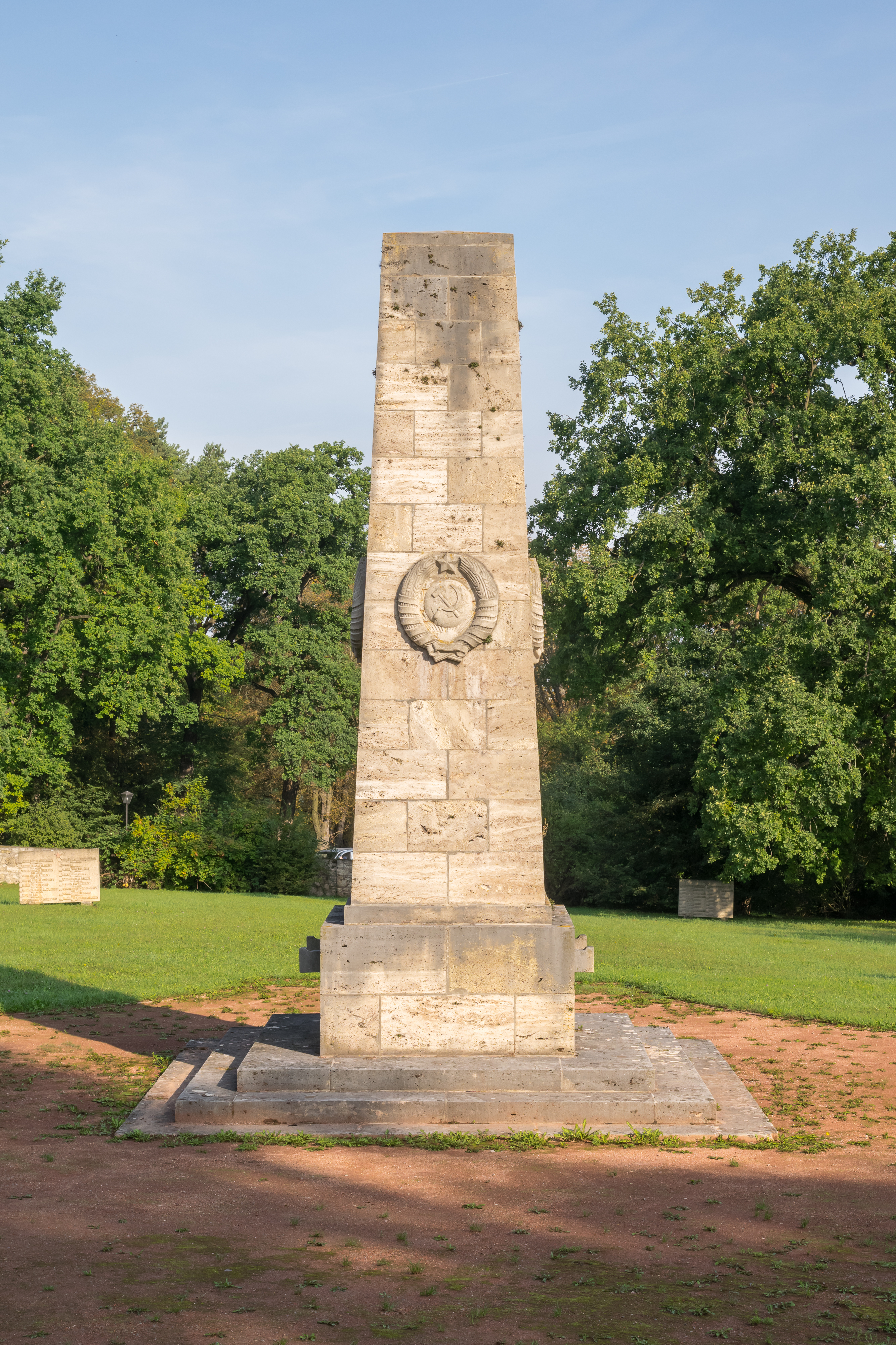 Sowjetischer Friedhof in Weimar-Ehringsdorf bei Schloss Belvedere